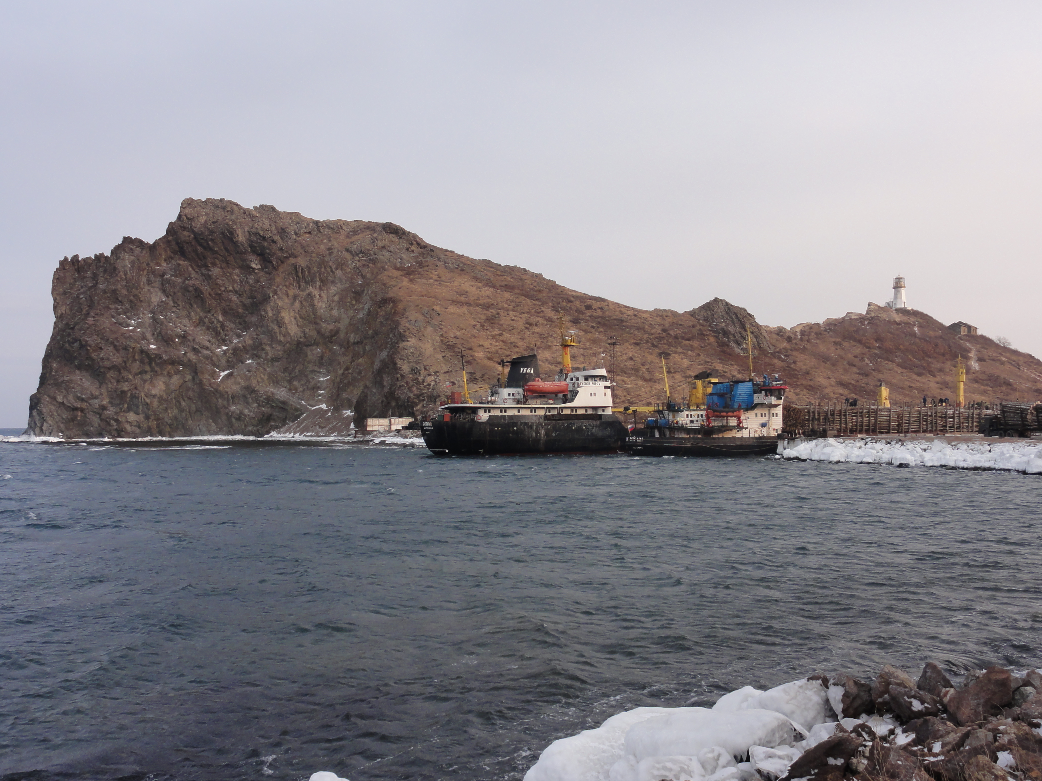 Сухогруз «Фёдор Попов» проекта 1576 (IMO 7421112) под погрузкой в горловине гавани Ковш